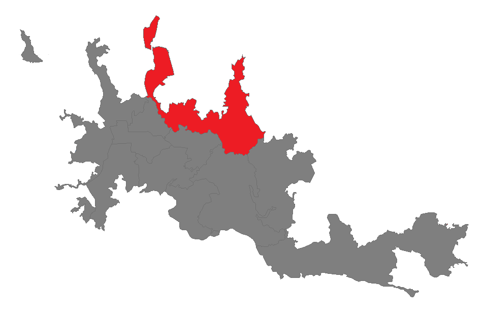 comuna ciudadela del norte de manizales